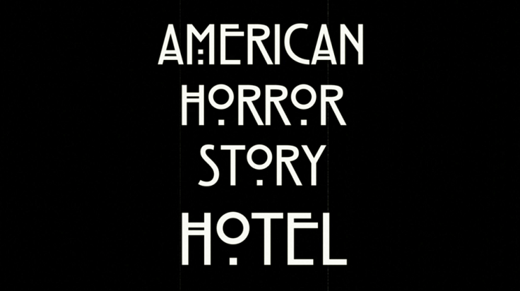 Logo oficial de American Horror Story: Hotel.